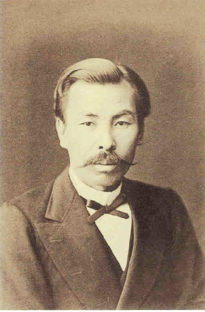 a Japanese man 品川弥二郎 (Yajiro Shinagawa)